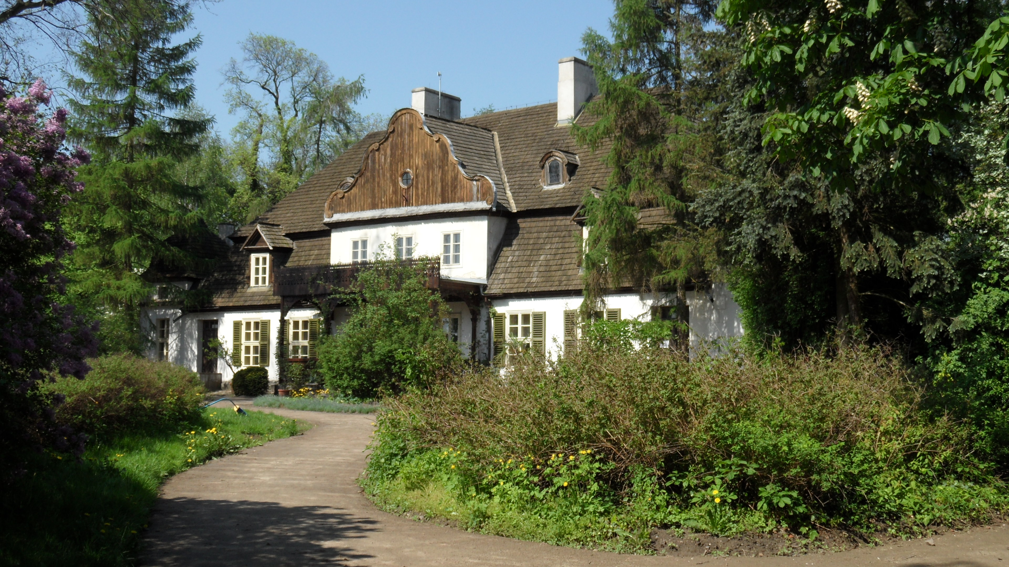 zespół dworski, obecnie Muzeum Ziemi Średzkiej, z XVIII-XIX w.: dwór